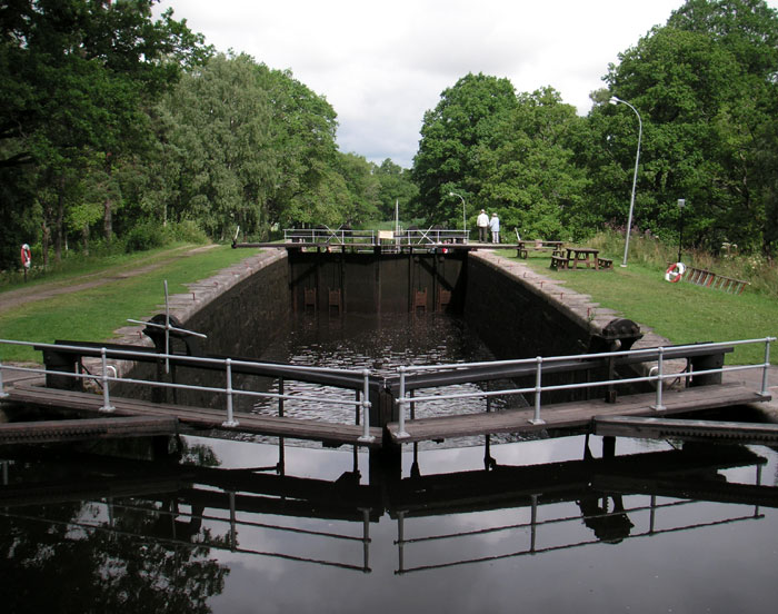 Hjälmare kanal, Hällby slussar